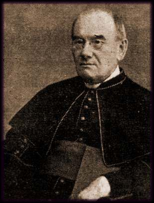 Msgre. Augustin Kratochvíl (1865 - 1946), Český římskokatolický duchovní a historik .